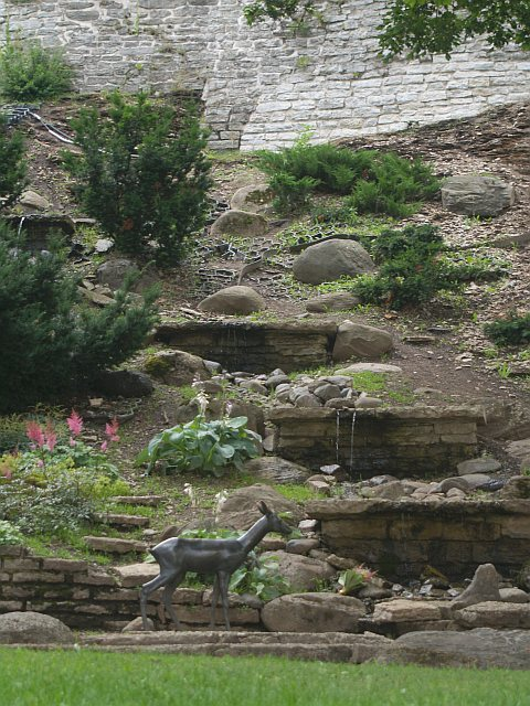 "Metskits" on Jaan Koorti 1929. aastal valminud pronksskulptuur Tallinnas Nunne tänava haljasalal.